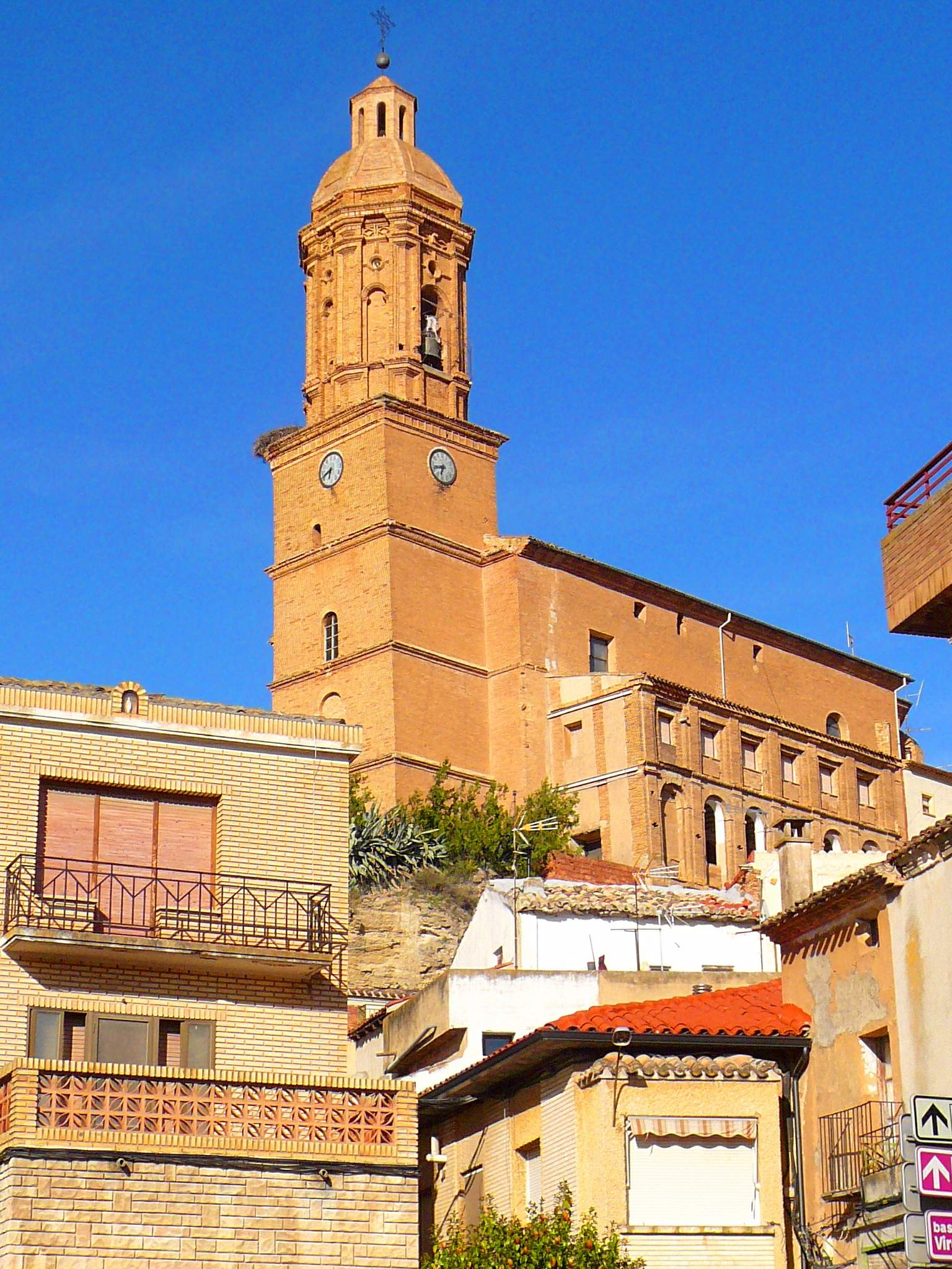 Iglesia de San Julián y Santa Basilisa (Andosilla, Navarra)